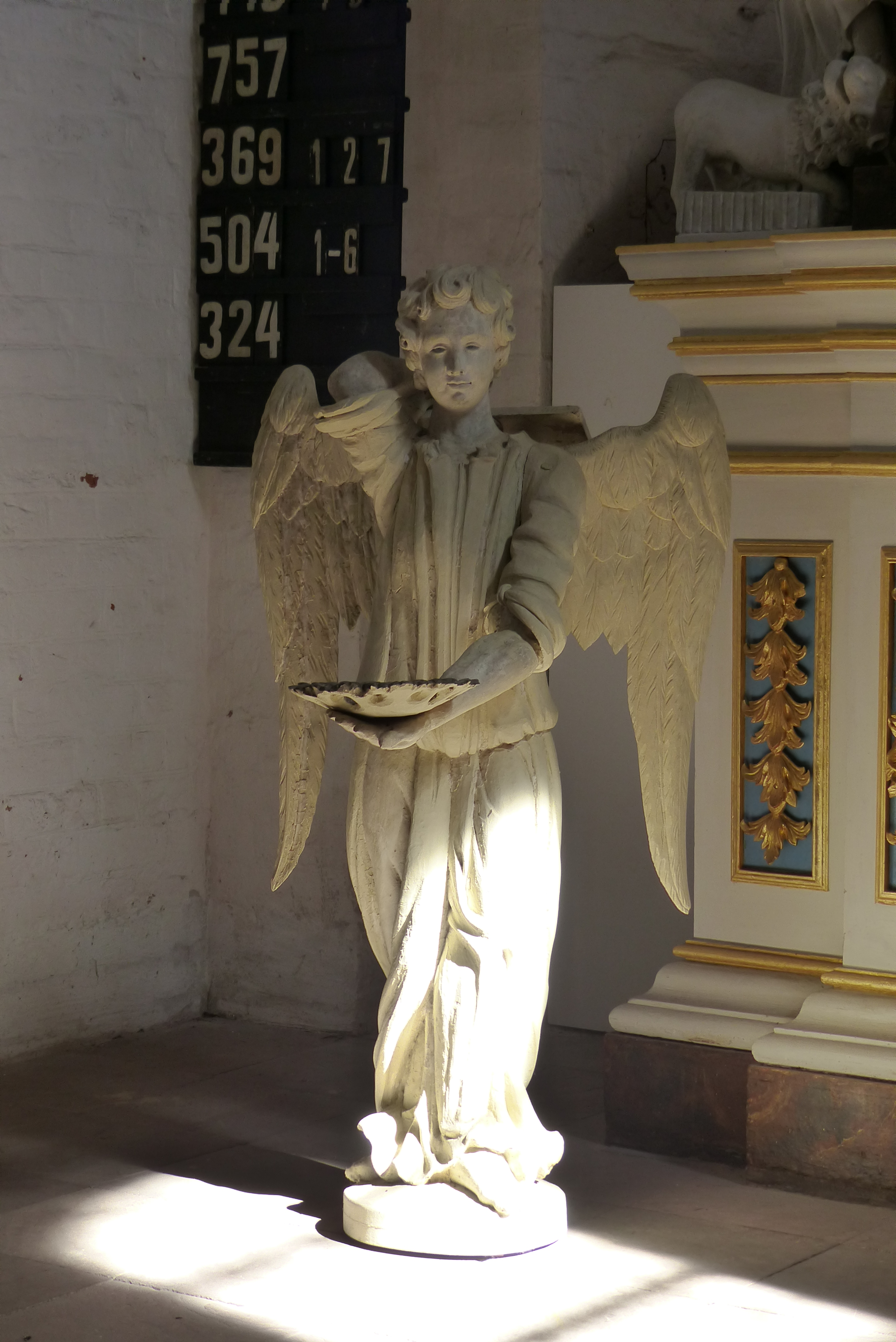 Auffallendes Interieur ist die anmutige Skulptur eines Taufengels im Chorbereich